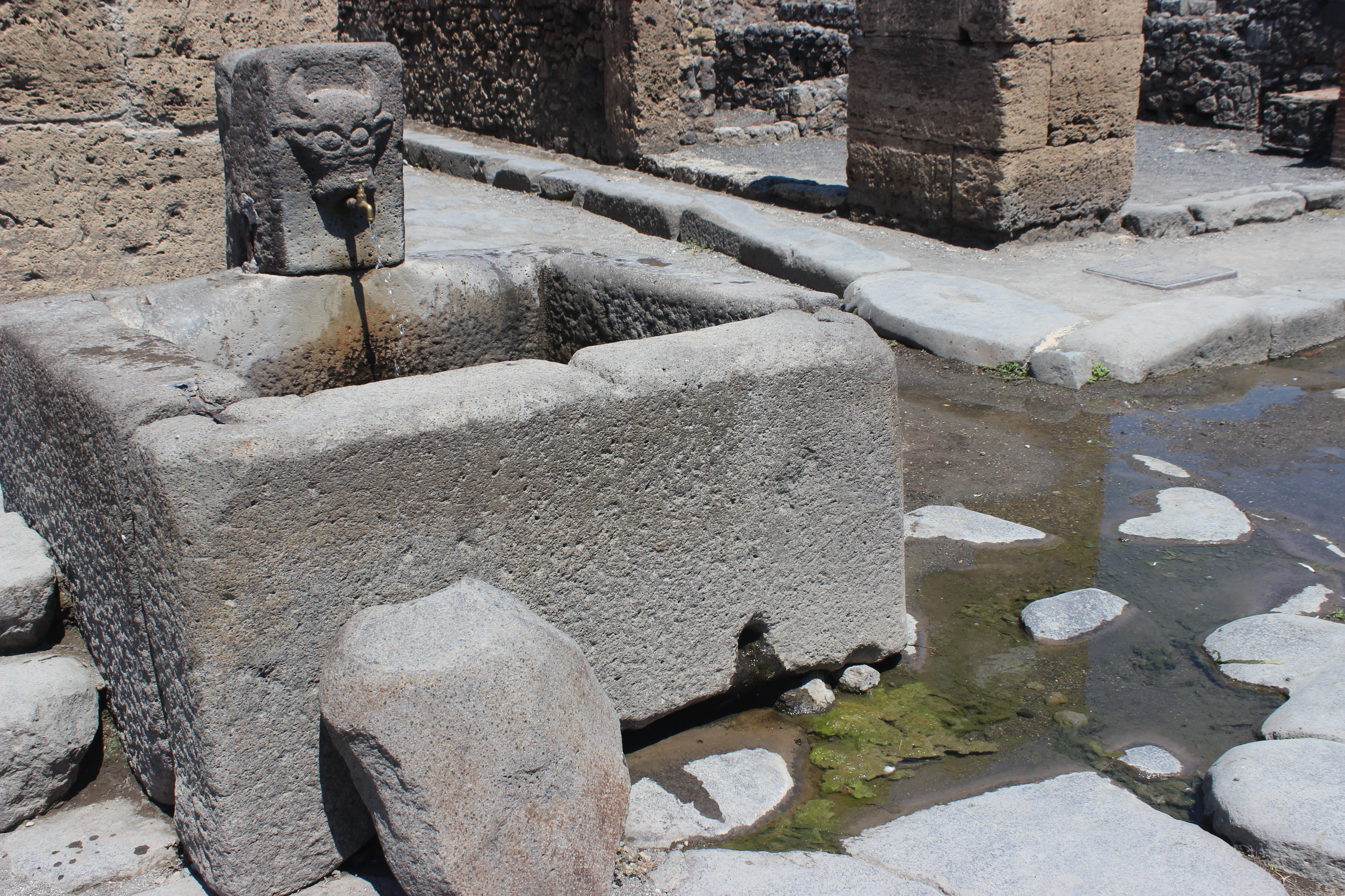 Pompeya. Fuente pública en la Via dell'Abbondanza.